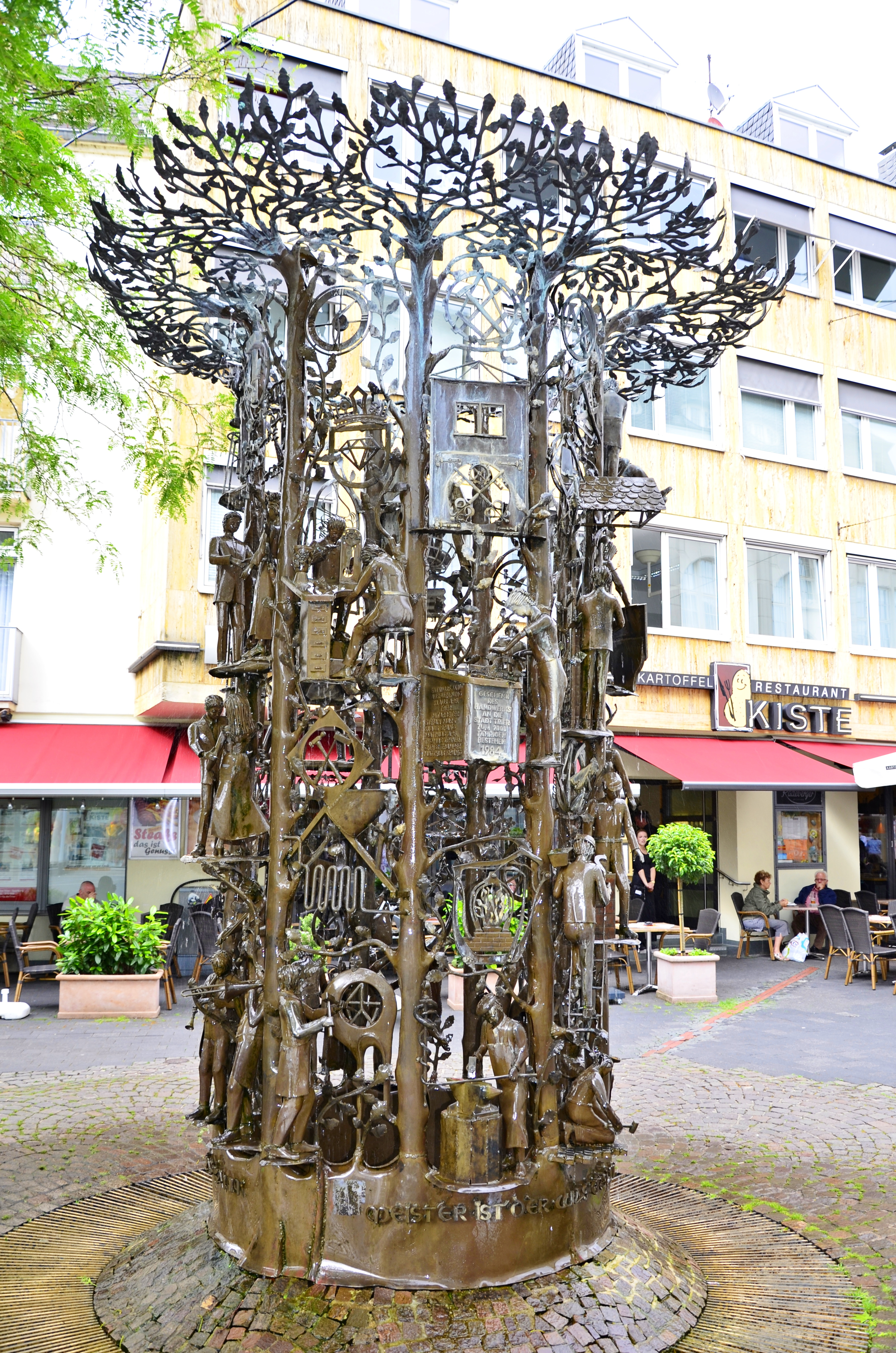 Trier, Brunnen des Handwerks von Klaus Apel (14.02.1927 - 27.07.2013) an der Ecke Fahr- und Nagelstraße, gestiftet von der Trierer Handwerkskammer und der Kreishandwerkerschaft 1984 anlässlich der 2000-Jahr-Feier der Stadt Spruch: "Lehrling ist jedermann - Geselle ist wer was kann - Meister ist der was ersann".